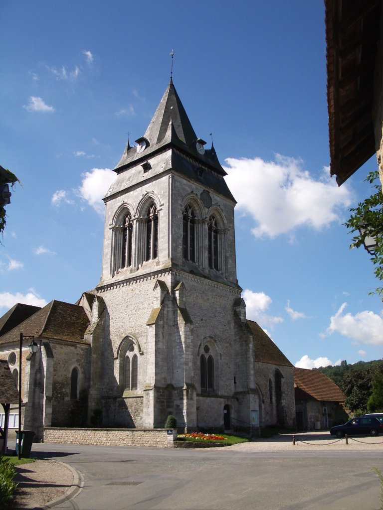 L'église Saint-Pierre de Saint-Pierre-d'Autils (Eure) - pour mémoire : en ravalement en avril 2017 - flèche du clocher déposée le mardi 18 avril - Remise en place le 13 mars 2018. Le 2 mai, vu déposer l'échafaudage. Une seule horloge est désormais en fonction (réhabilitation), sur la face donnant sur la place de l'église.